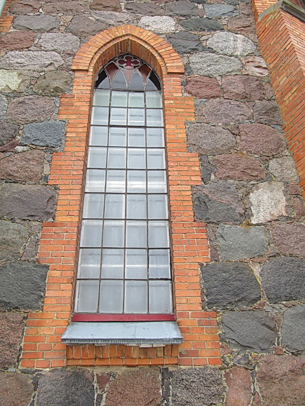 Лаздуны 1. Касцёл Святых Сымона і Тадэвуша